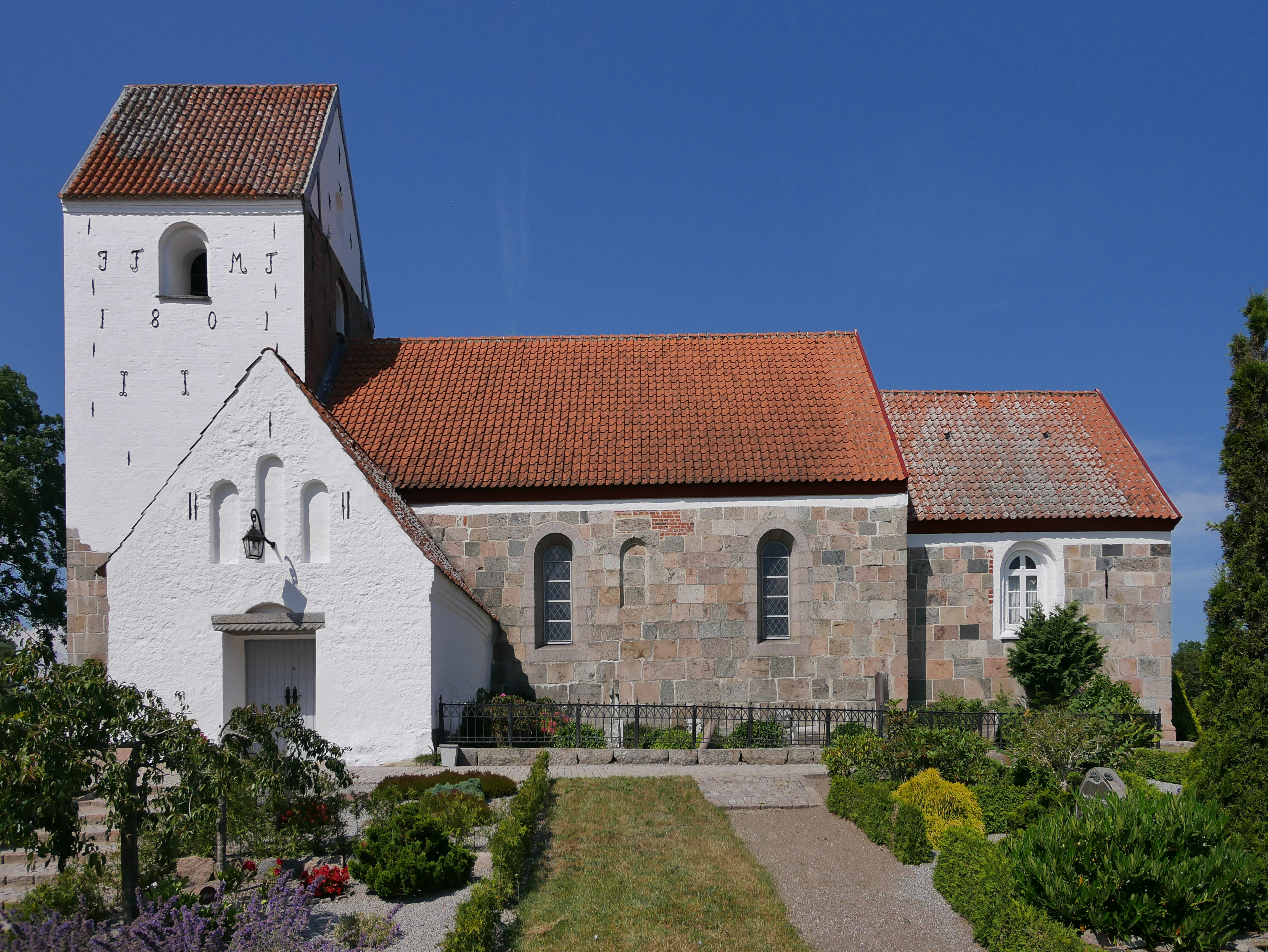 Kirche von Vive am Mariagerfjord (Dänemark, Nord-Jütland)- Erbaut etwa 1250, schöne Innenausstattung: romanischer Taufstein, Renaissacealter, Kanzel aus dem Historismus, moderne Orgel Ansicht von Süden